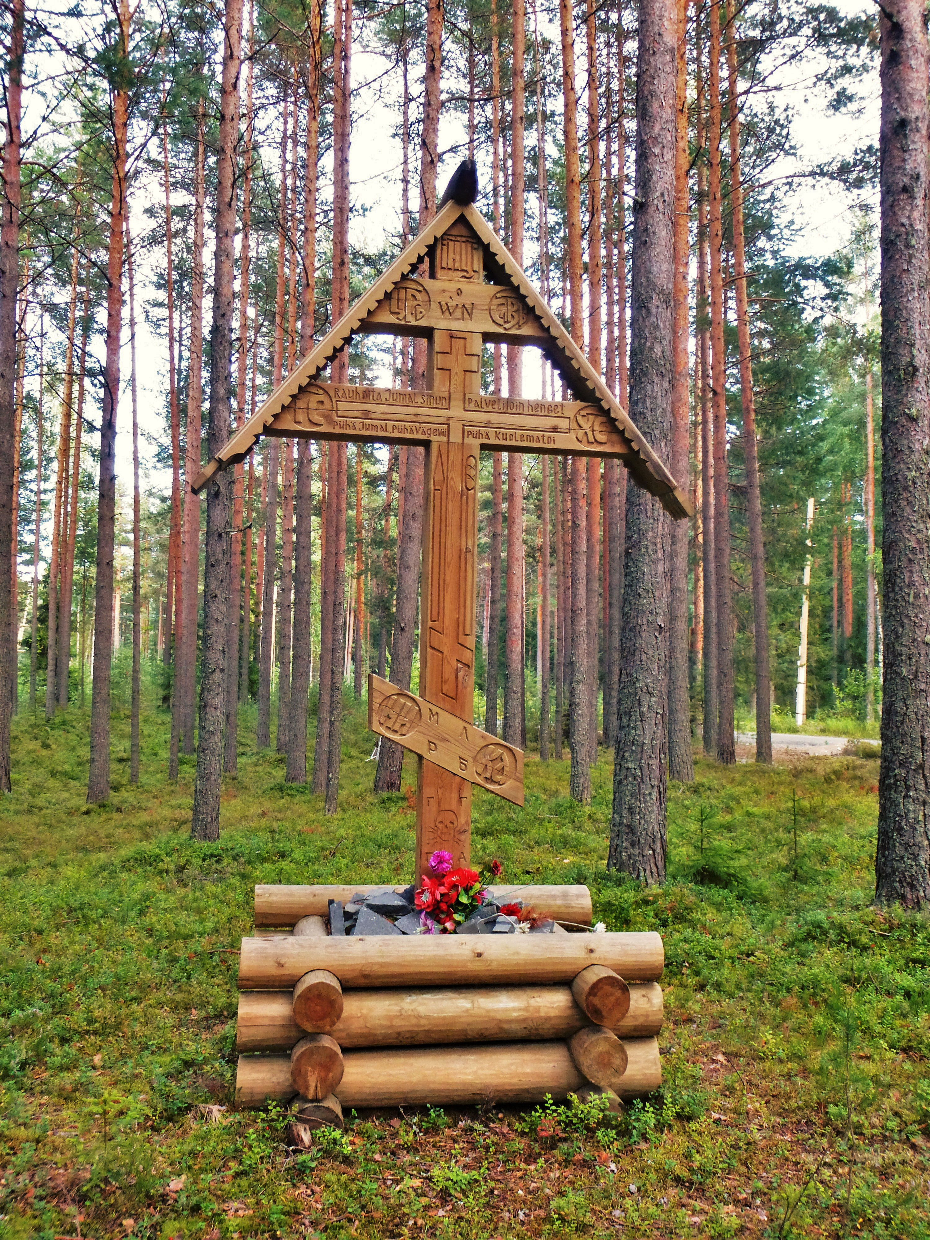 Поклонный крест жертвам массовых репрессий 1937-1938 г.г. в местечке "Красный Бор" под Петрозаводском.